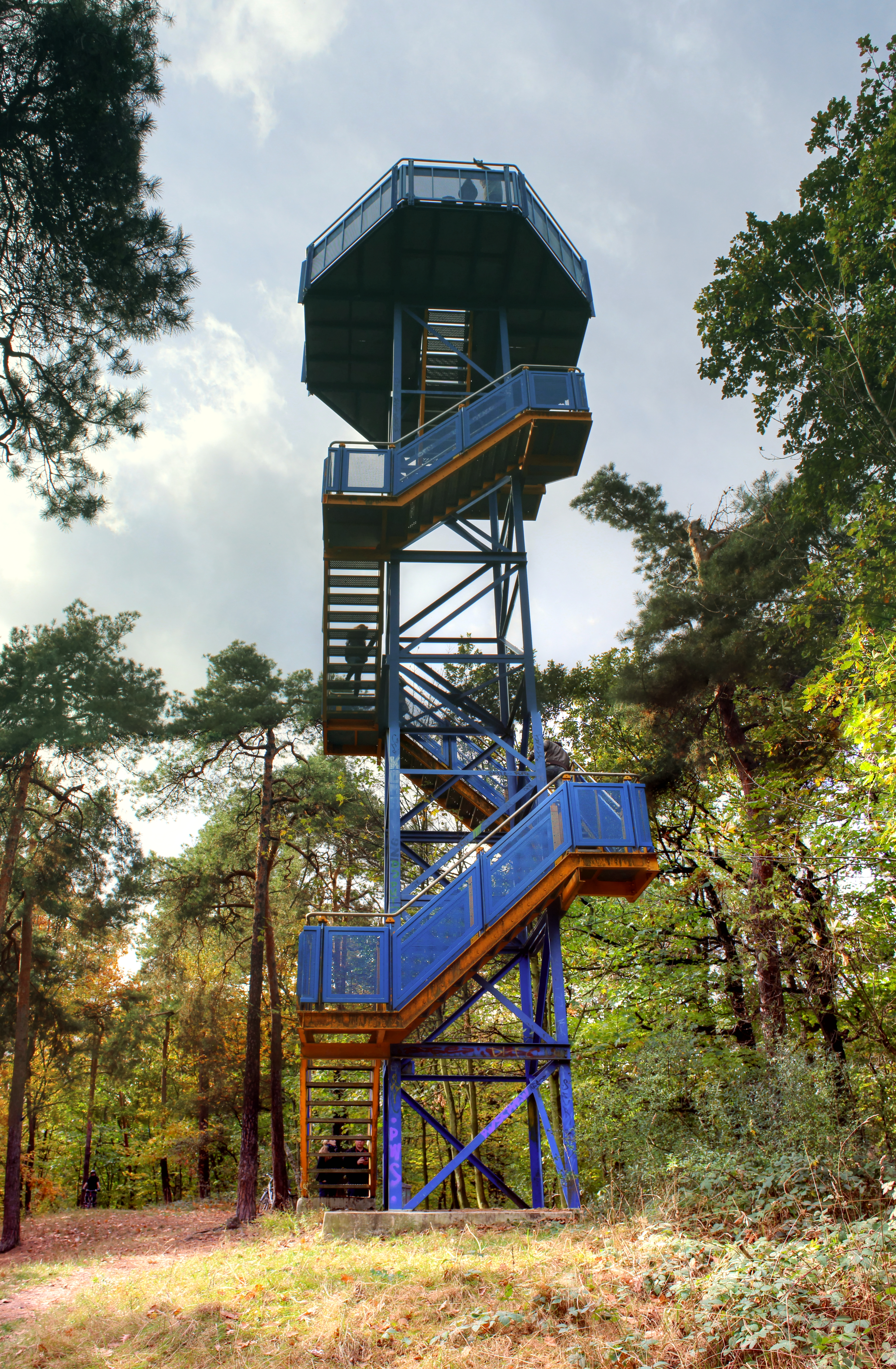 Kolkturm